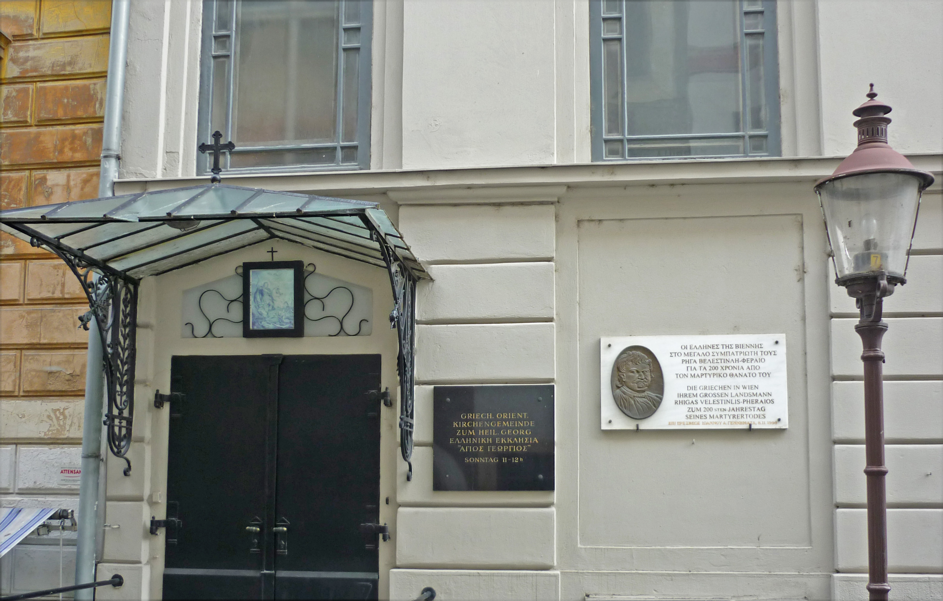 Griechisch-orientalische Kirche in Wien, Griechengasse